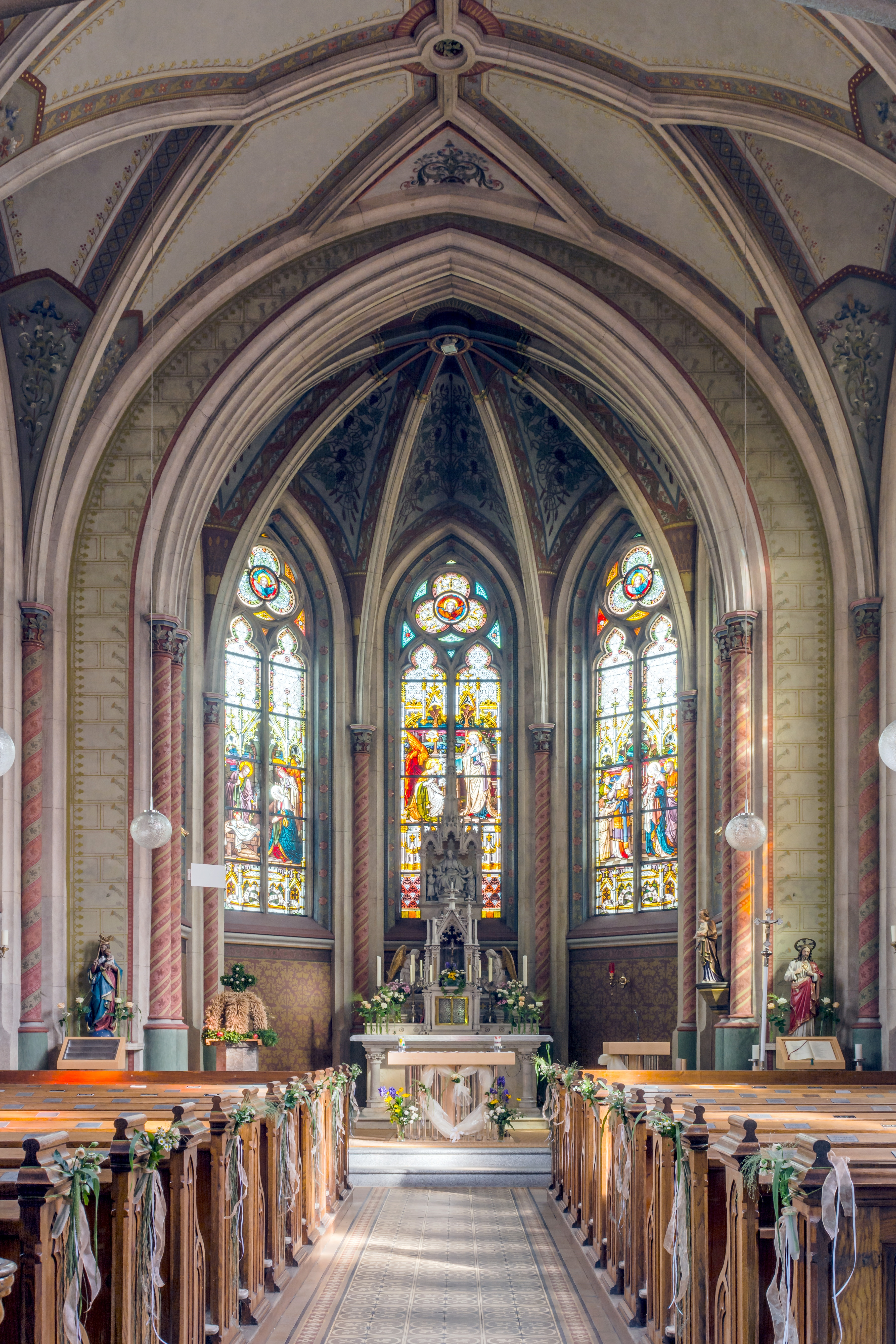 Die Expositurkirche Göttlicher Kinderfreund in Rutzenham wurde 1897 bis 1899 als Schulkapelle nach Plänen des Baumeisters Paul Hochegger errichtet. Der Hochaltar ist aus Carraramarmor. Auf den Fenstern im Chor sind Szenen aus der Kindheit Christi zu sehen. Die Bemalung des Innenraums ist noch im Originalzustand von 1901. Die Kirche ist durchgehend im neugotischen Stil gehalten.